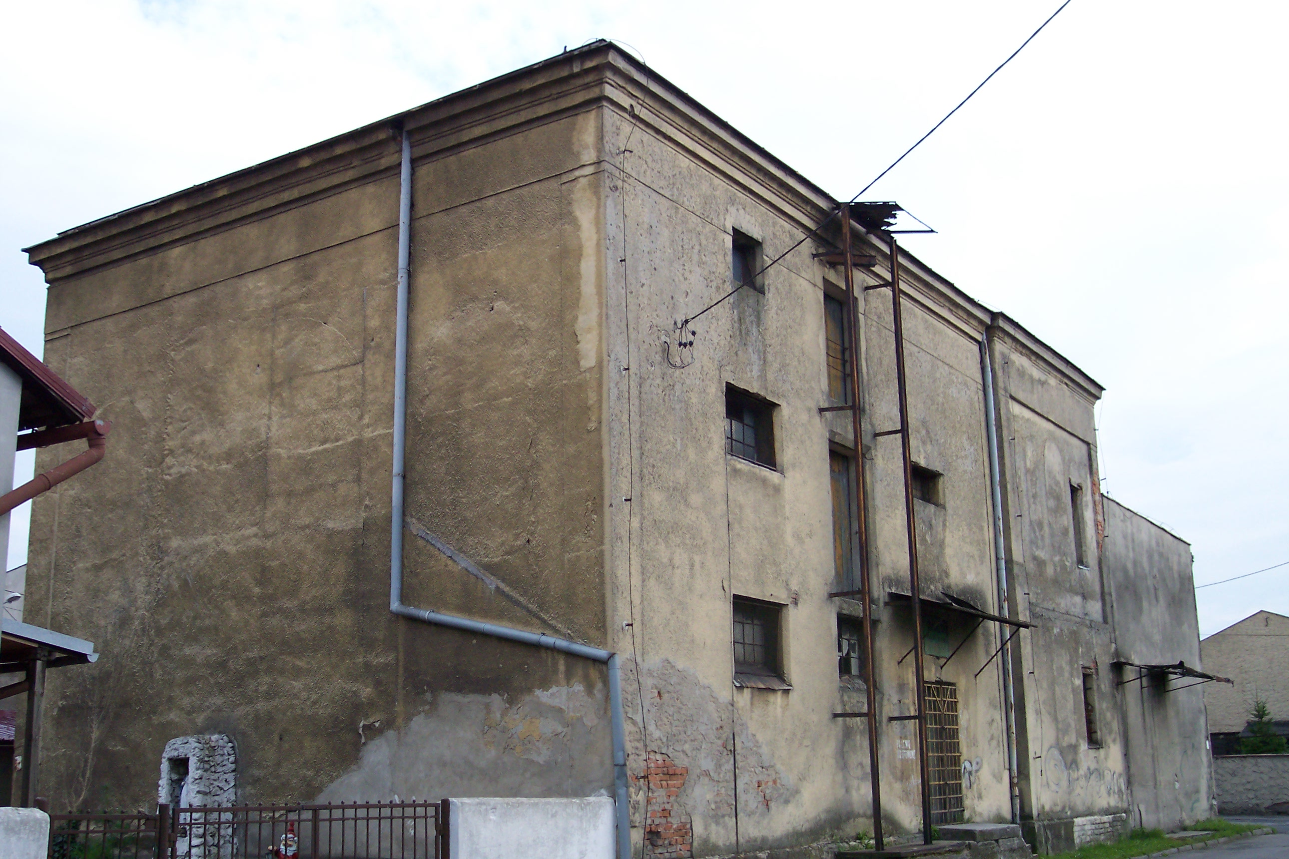 Budynek byłej synagoga w Wielowsi (województwo śląskie)